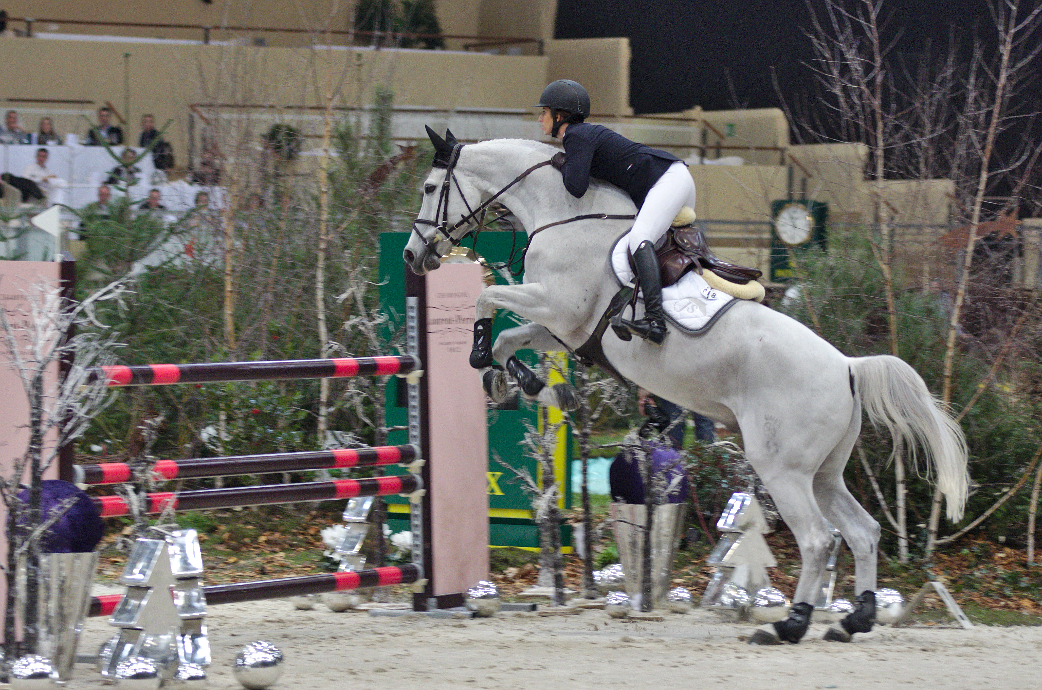 CHI Genève 2013 - 20131214 - Janika Sprunger et JL's Komparse